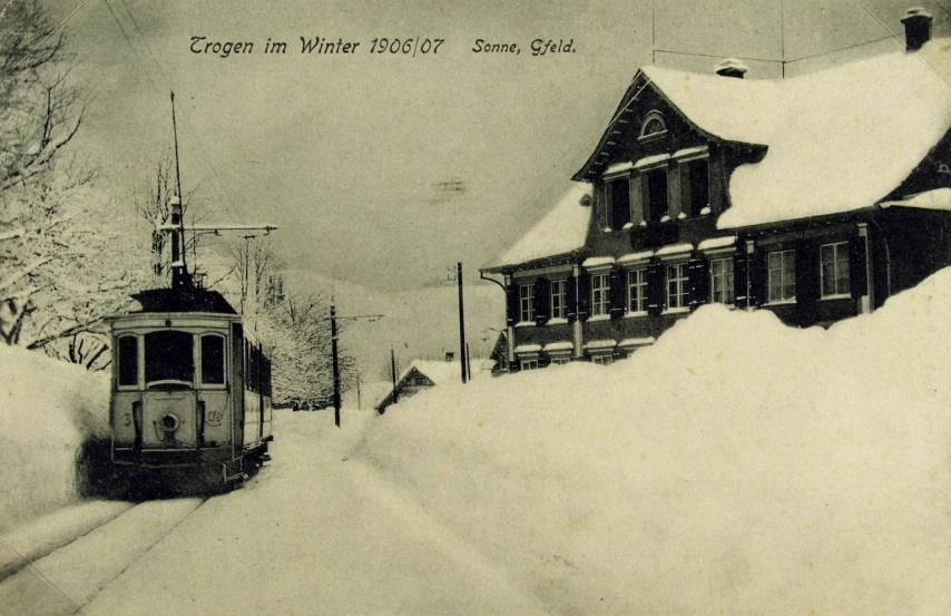 Die Trogenerbahn im Gfeld, Trogen